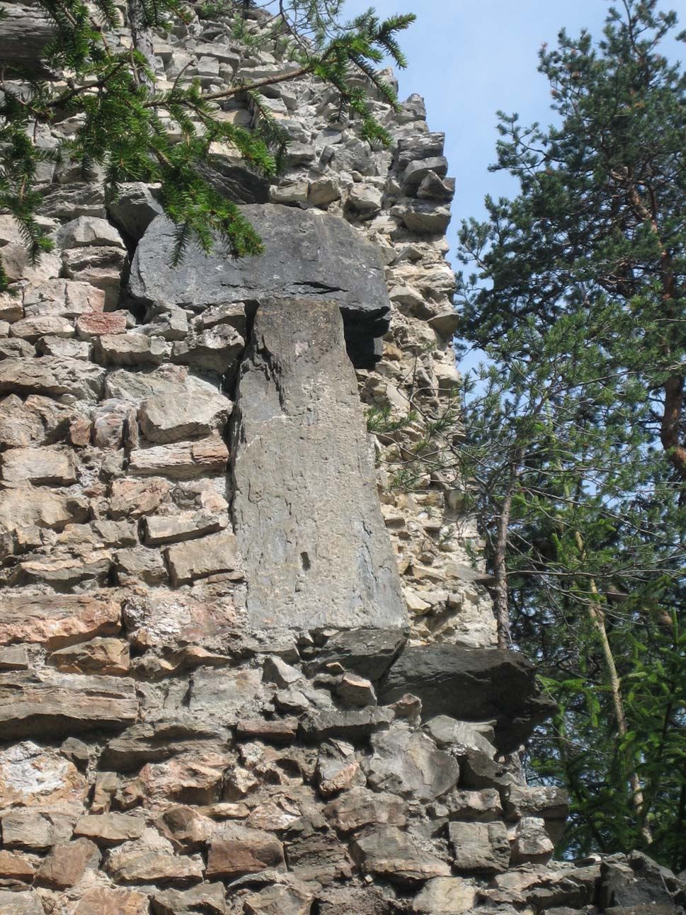 Hocheingang des Turmes